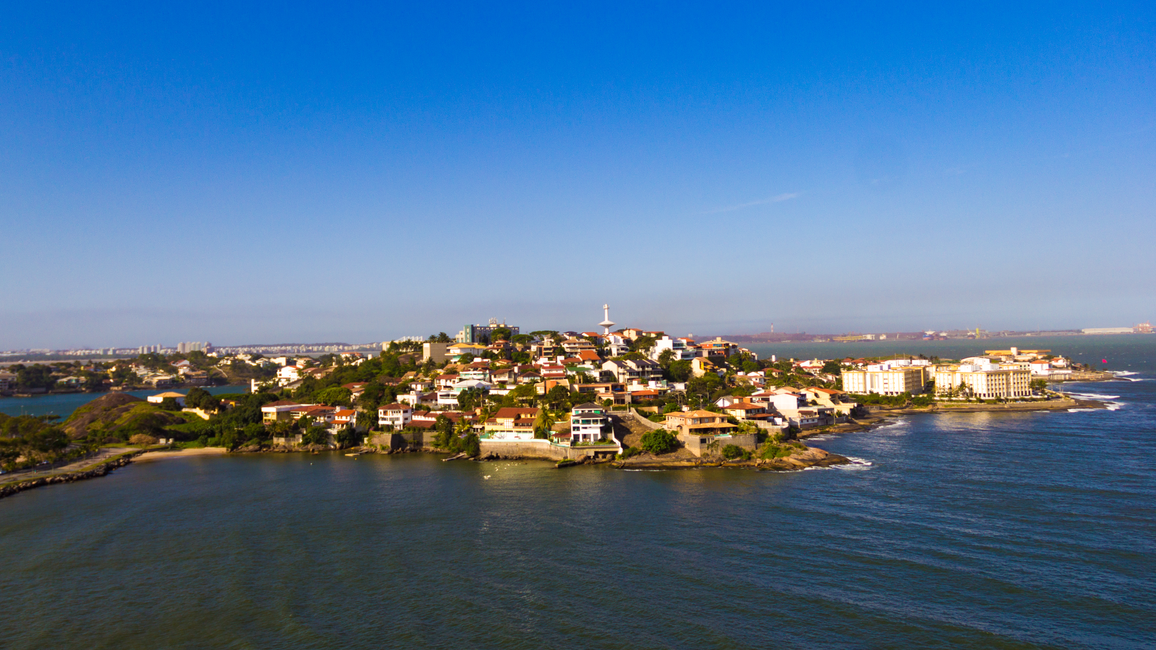 Português do Brasil: Ilha do Boi